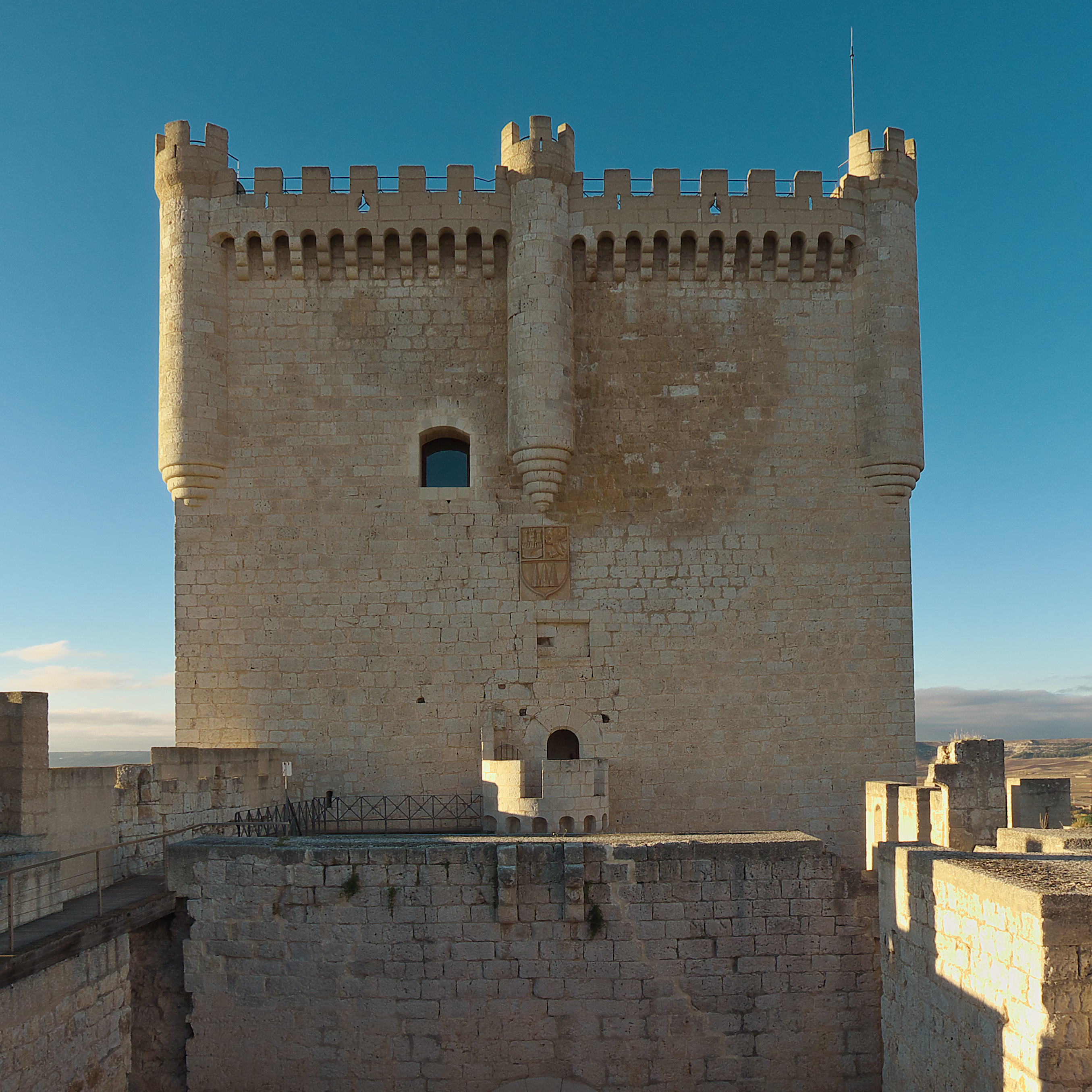 Torre del Homenaje. Juan II de Castilla concede a Pedro Girón, o Pedro Téllez-Girón y Pacheco, o Pedro Girón Acuña Pacheco, los derechos sobre el Castillo de Peñafiel (1456)